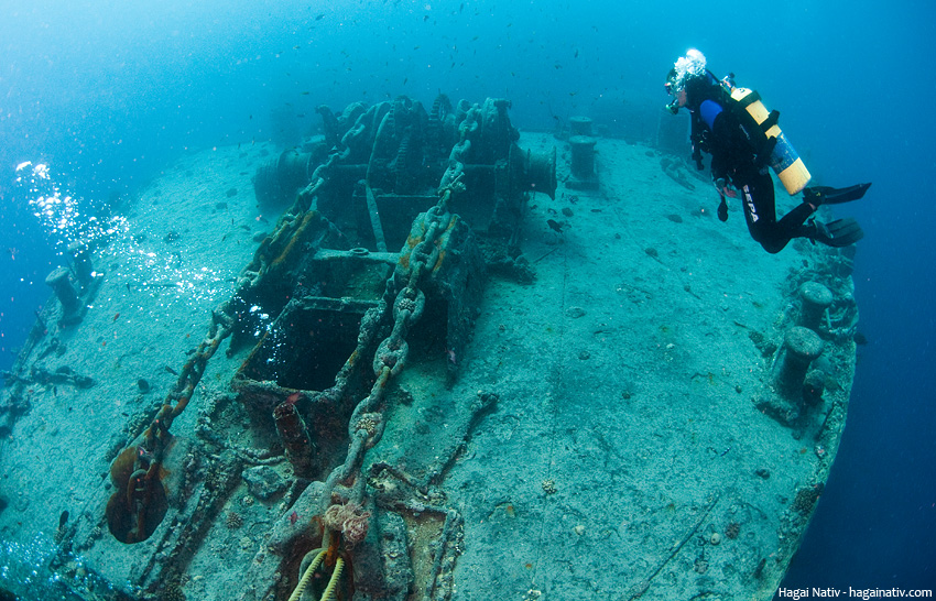 סיפון עליון של ספינת המטען שטובעה במלחמת העולם השניה במי מפרץ סואץ- טיסלגורם